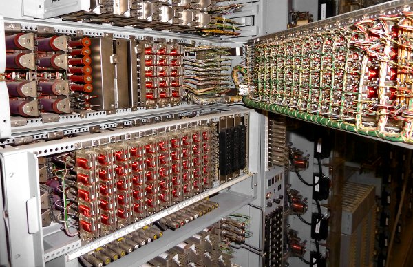 Relaissuchwähler in ESK Technik im Fernwahlsystem T62